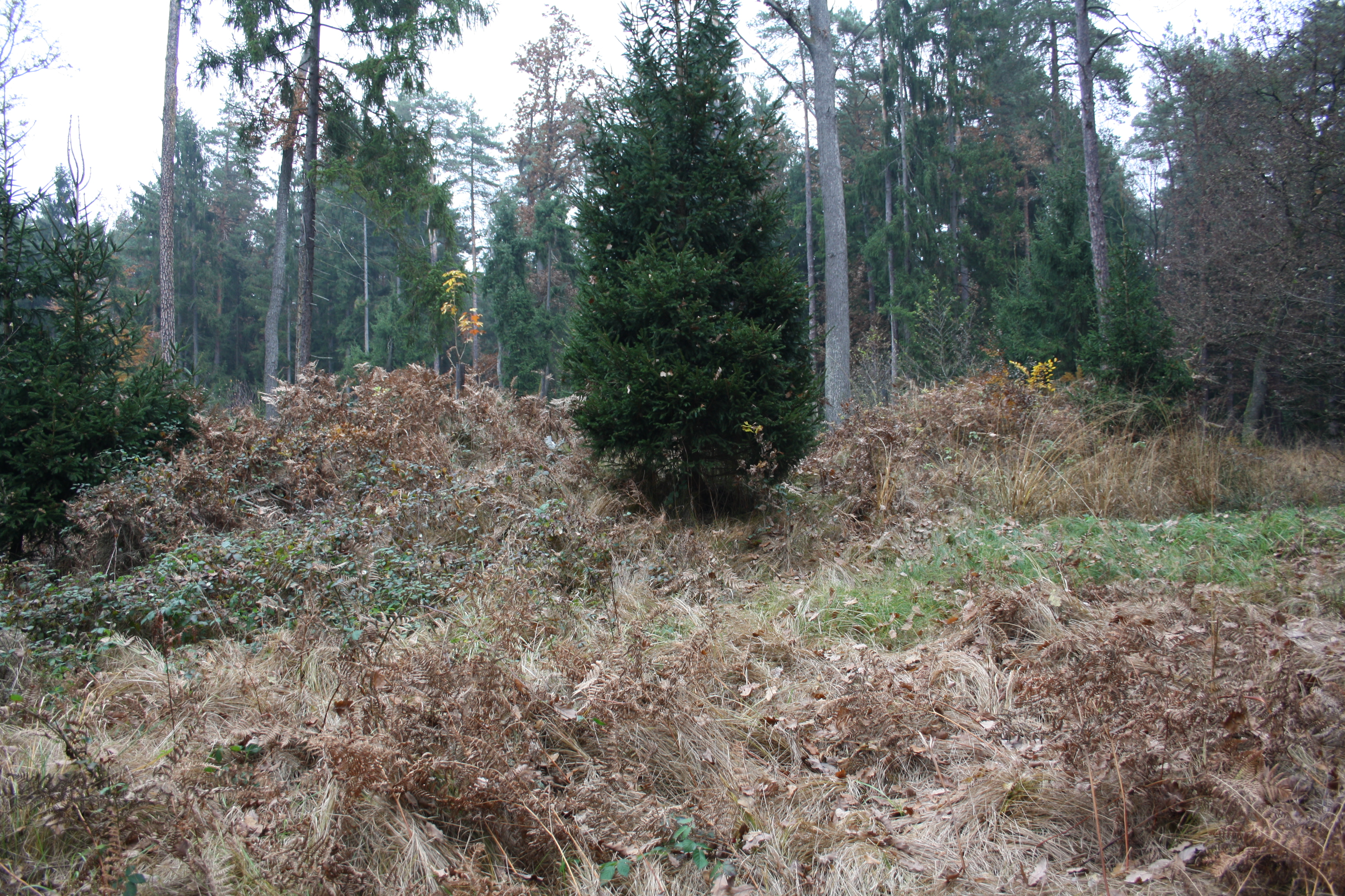 Hügelgräber im Kaiserwald zwischen Unterpremstätten und Lieboch